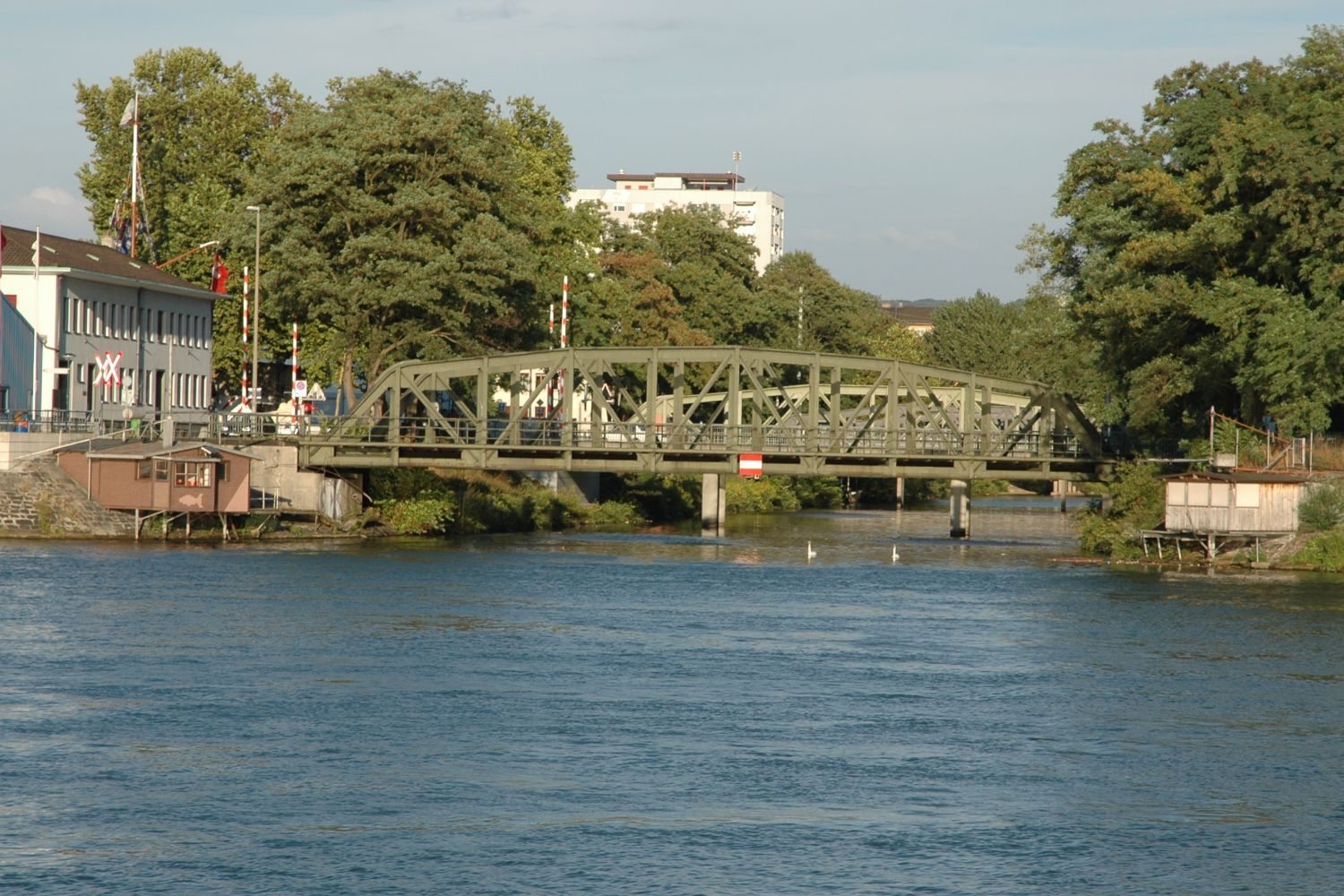 Beschreibung: Die Mündung der Wiese in den Rhein bei Basel Datum: 2. August 2006 Ort: Kleinhüningen, Basel, Schweiz Fotograf oder Zeichner: Alex Alex (de) Kamera: Nikon D 70 Software: The GIMP Andere Versionen: Lizenzstatus: GNU FDL